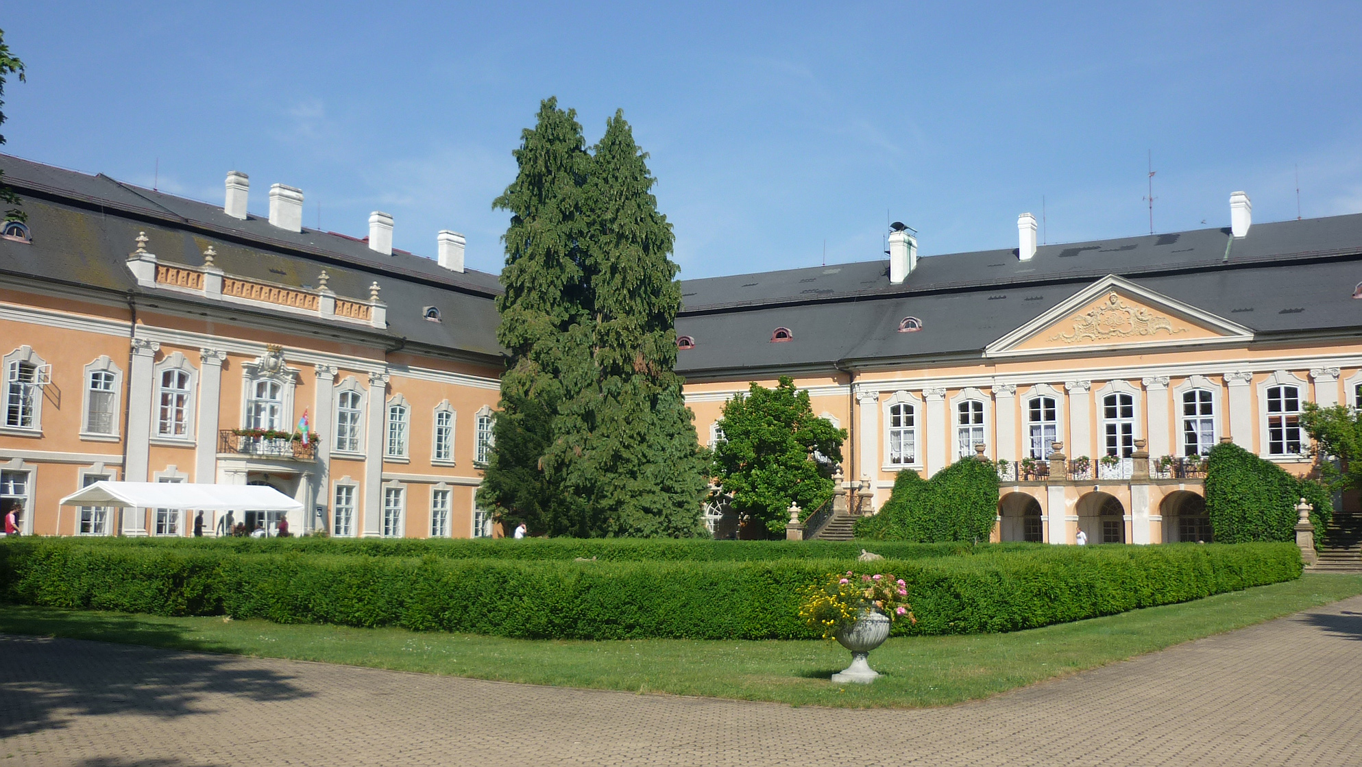 Schloss Petersburg (Petrohrad) in Nordböhmen